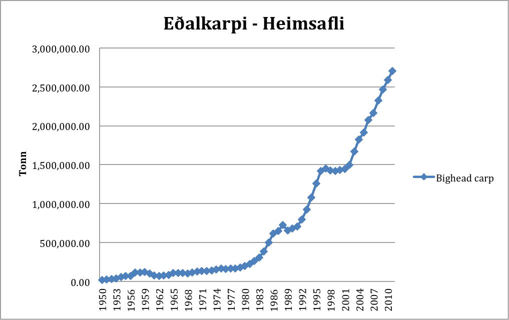 Eðalkarpi - Heimsafli